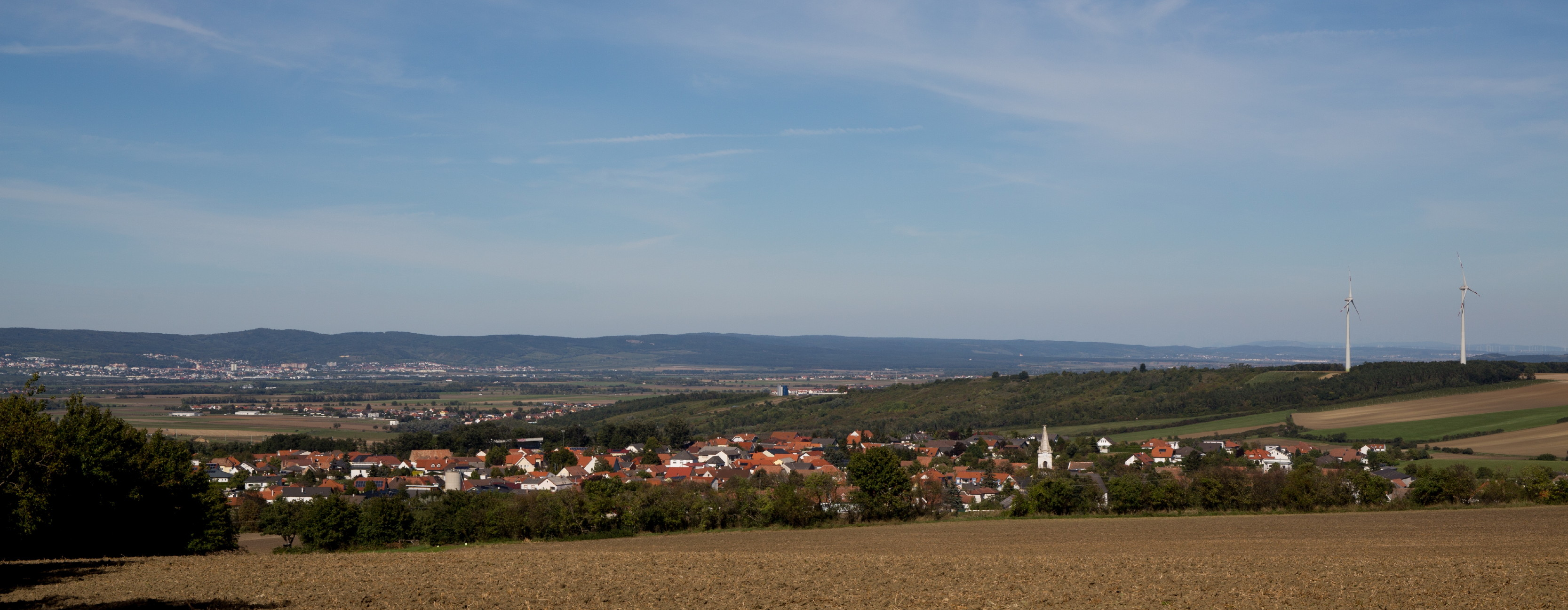 Baumgarten im Burgenland